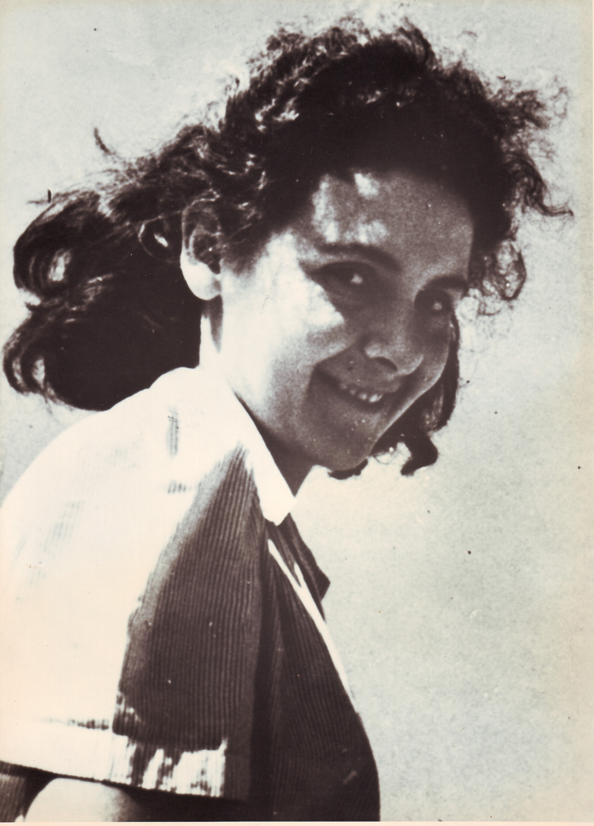 חיה לזר